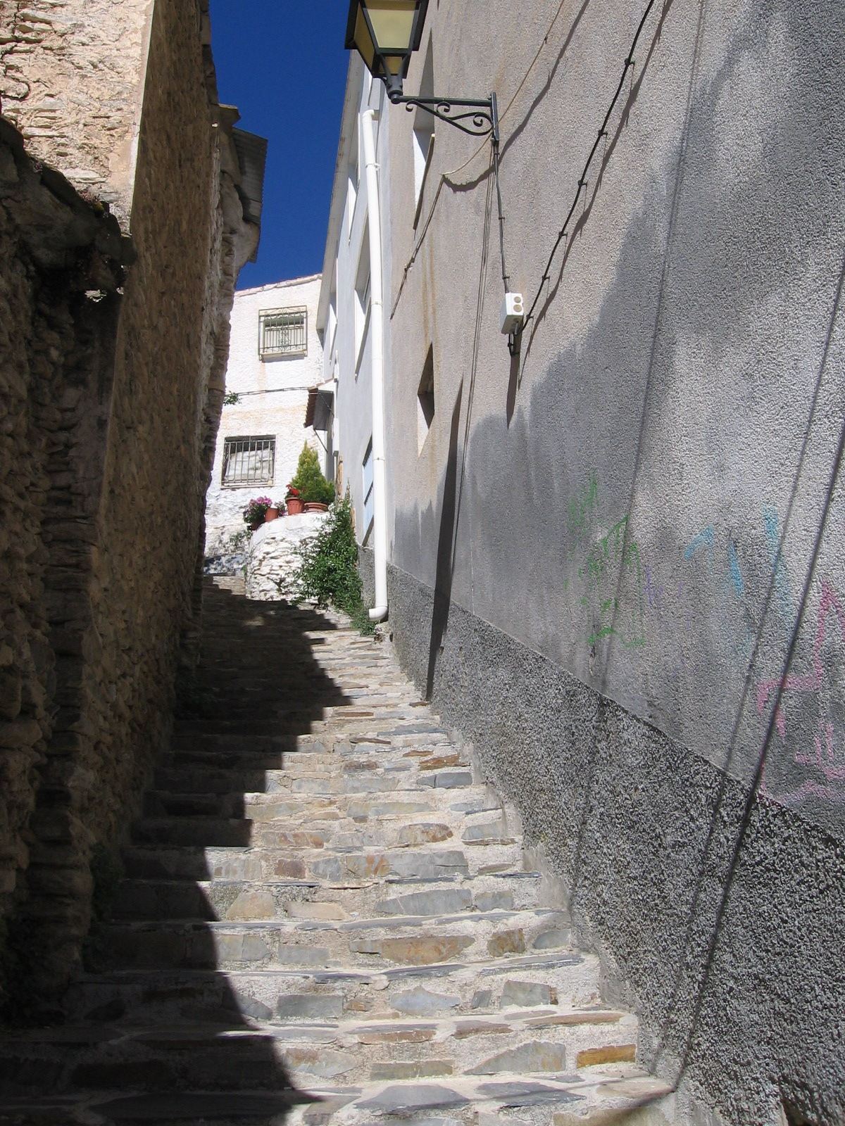 Calle típica, Bacares, España.